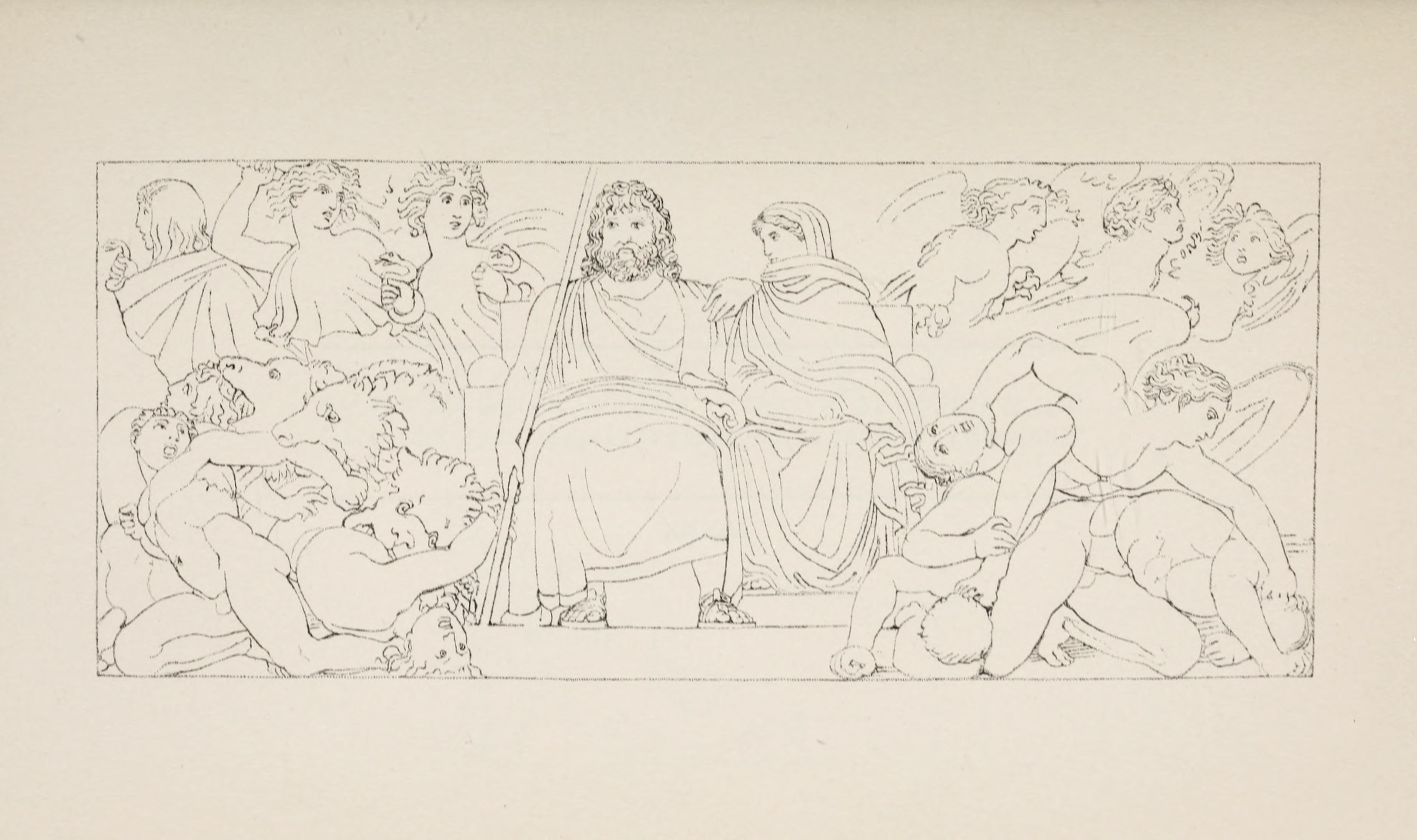 Die Unterwelt, das Reich des Hades (von links nach rechts Erinnyen, Kerberos, Hades, Persephoneia, Harpyien, Tod). – Hesiod, Theogonie V. 768, vgl. Schwab, Sagen des klassischen Altertums I. 183ff.